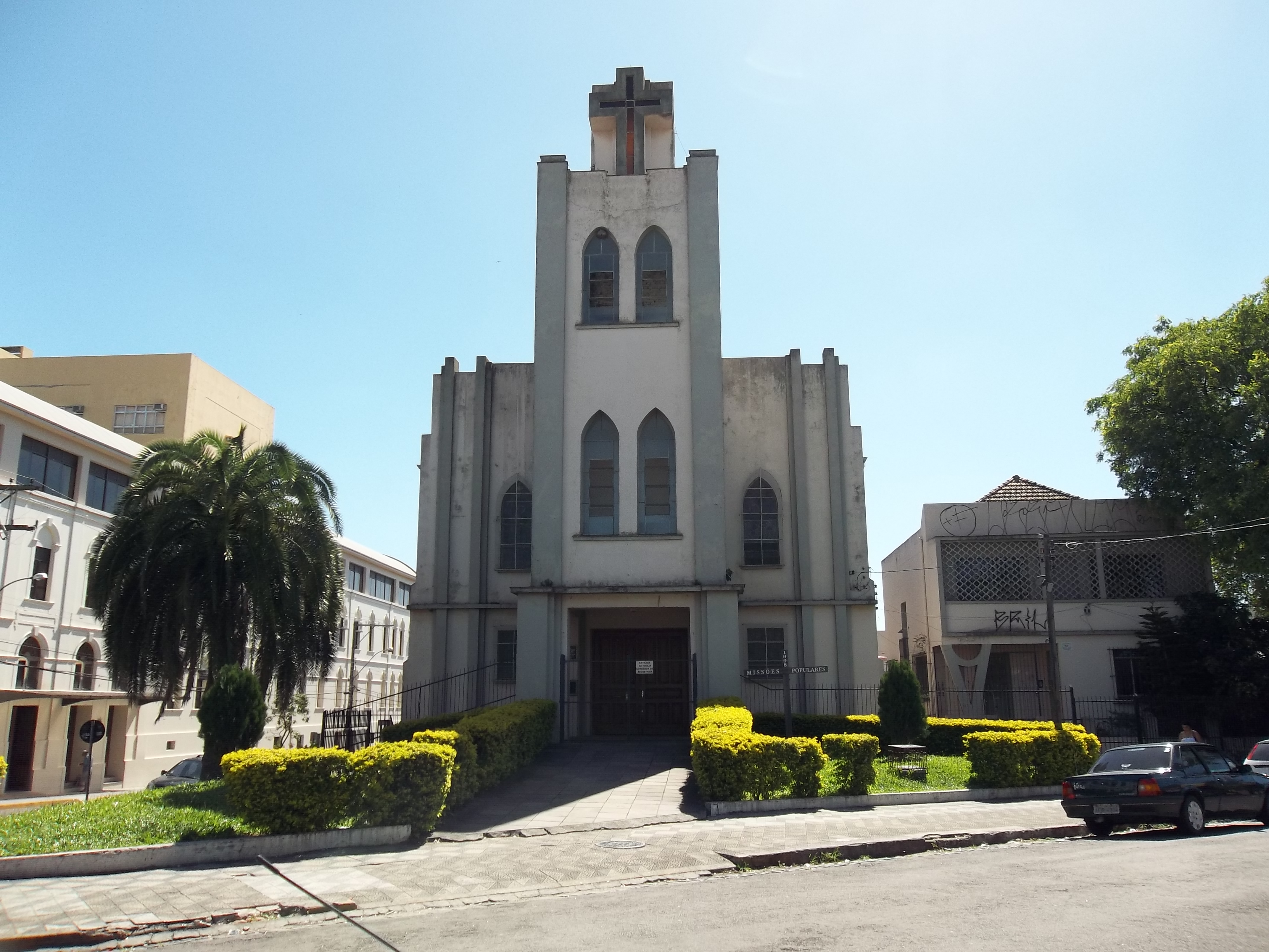 Igreja Nossa Senhora do Rosário, Paróquia criada em 07/08/1959 - Nossa Senhora do Rosário, Santa Maria, Rio Grande do Sul, Brasil